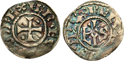 Diamètre : 21,5 mm Métal : Argent Poids observé : 1,28 g. AVERS Légende : HERVEVS [HV]GO REX, (H et E liés et V et E liés). Traduction : (Hervé, Hugues roi). Description : Croix cantonnée aux 2 et 3 d'un besant. REVERS Légende : BELVA[CVS] CIVITAS. Traduction : (Cité de Beauvais). Description : Monogramme carolin (KAROLVS).Ænglisc: Mint name : Beauvais Diameter in mm : 21,5 mm Metal : Argent Actual weight : 1,28 g. OBVERSE Legend : HERVEVS [HV]GO REX, (H et E liés et V et E liés). Translation : (Hervé, Hugues roi). Description : Croix cantonnée aux 2 et 3 d'un besant. REVERSE Legend : BELVA[CVS] CIVITAS. Translation : (Cité de Beauvais). Description : Monogramme carolin (KAROLVS).